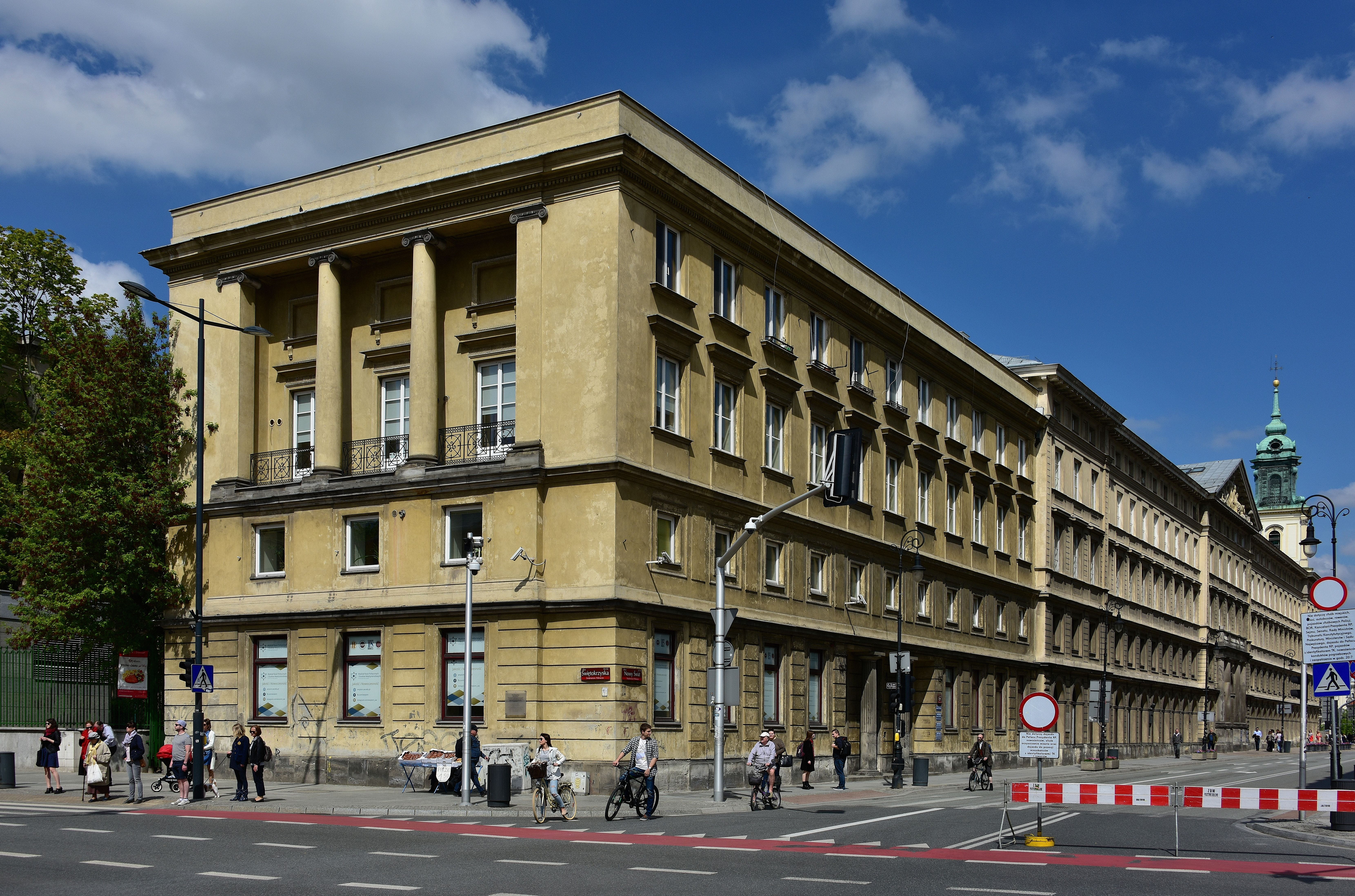 Pałac Zamoyskich przy ul. Nowy Świat 67 w Warszawie, widok od strony ul. Świętokrzyskiej